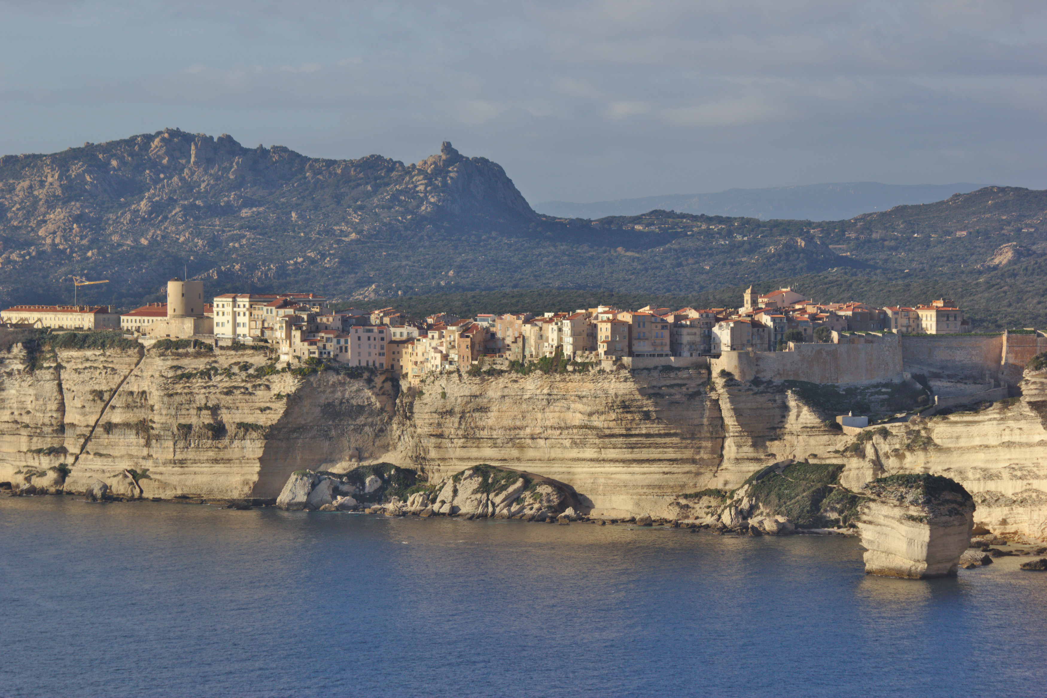 Hornjoserbsce: Napohlad městačka Bunifaziu (Bonifacio) na Korsice.